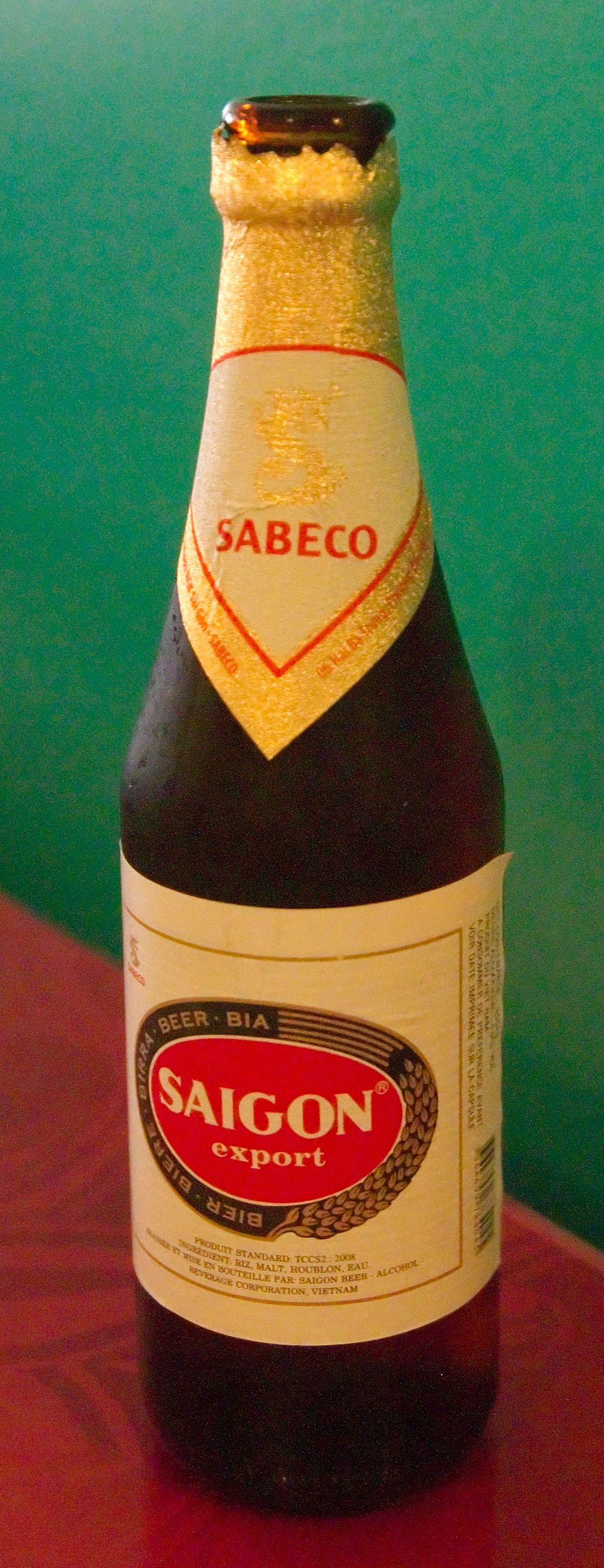 Bouteille de bière Saigon